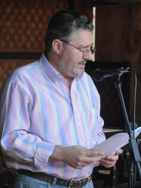 Fotografía de Humberto Gonzali